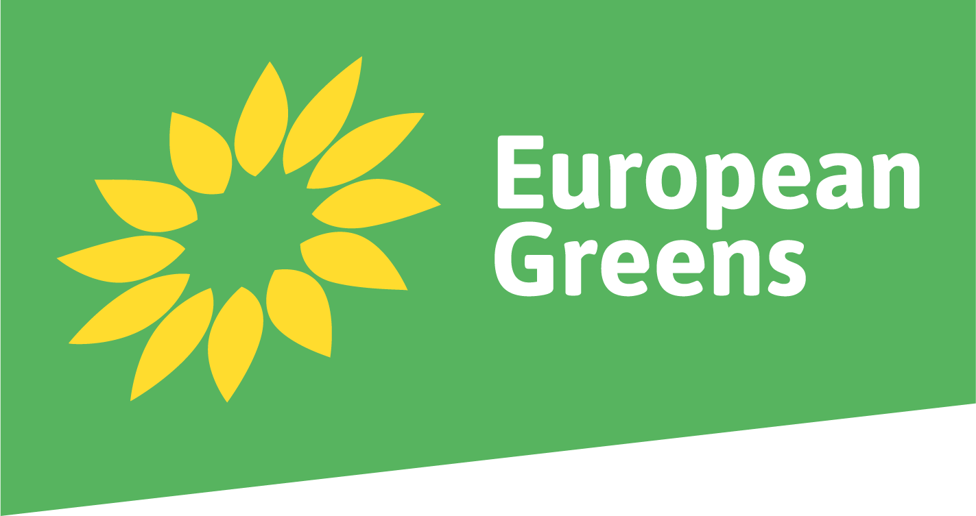 Das neue Logo der Europäischen Grünen Partei seit 2017